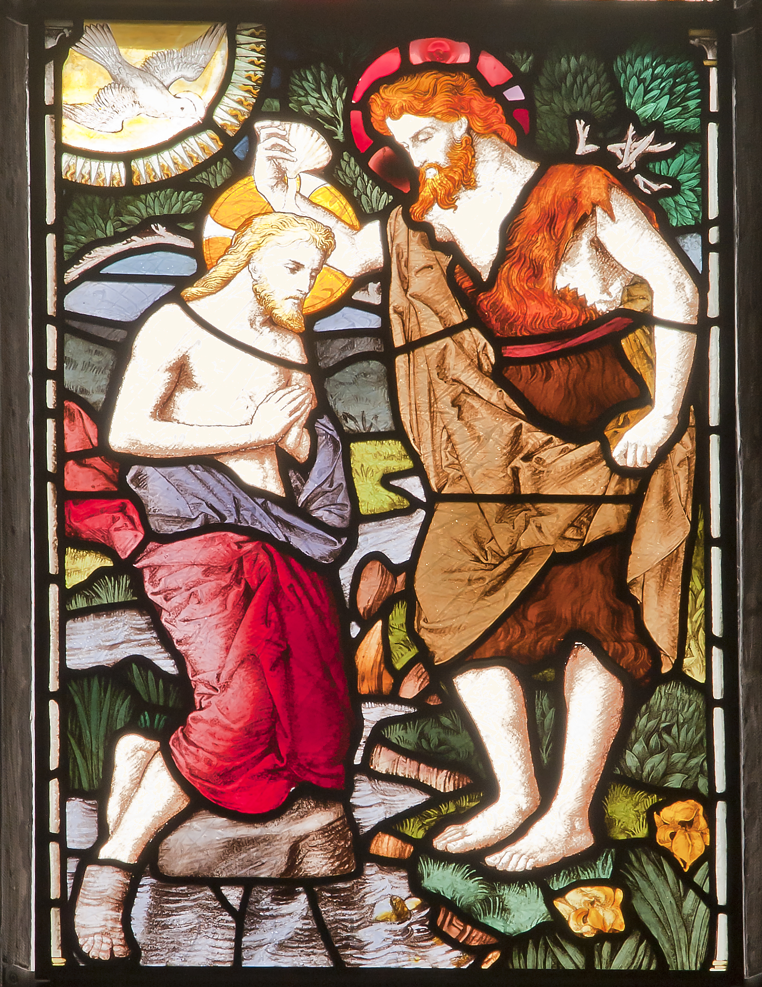 Kyrkfönster från 1800-talet i Nikolai kyrka i Örebro efter kartong av Carl Almquist. Motivet föreställer Jesu dop i floden Jordan.